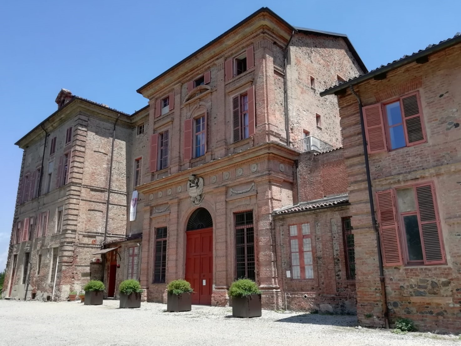 Foto della facciata di Villa Rey